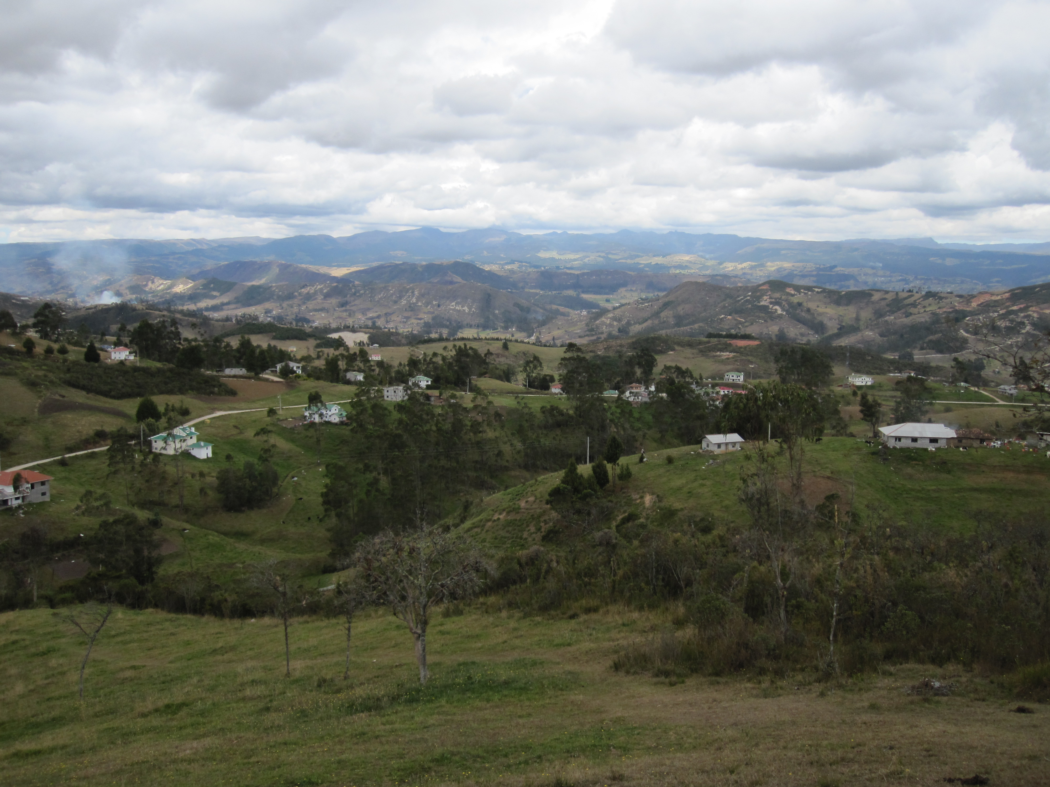 Parcoloma, Ecuador.